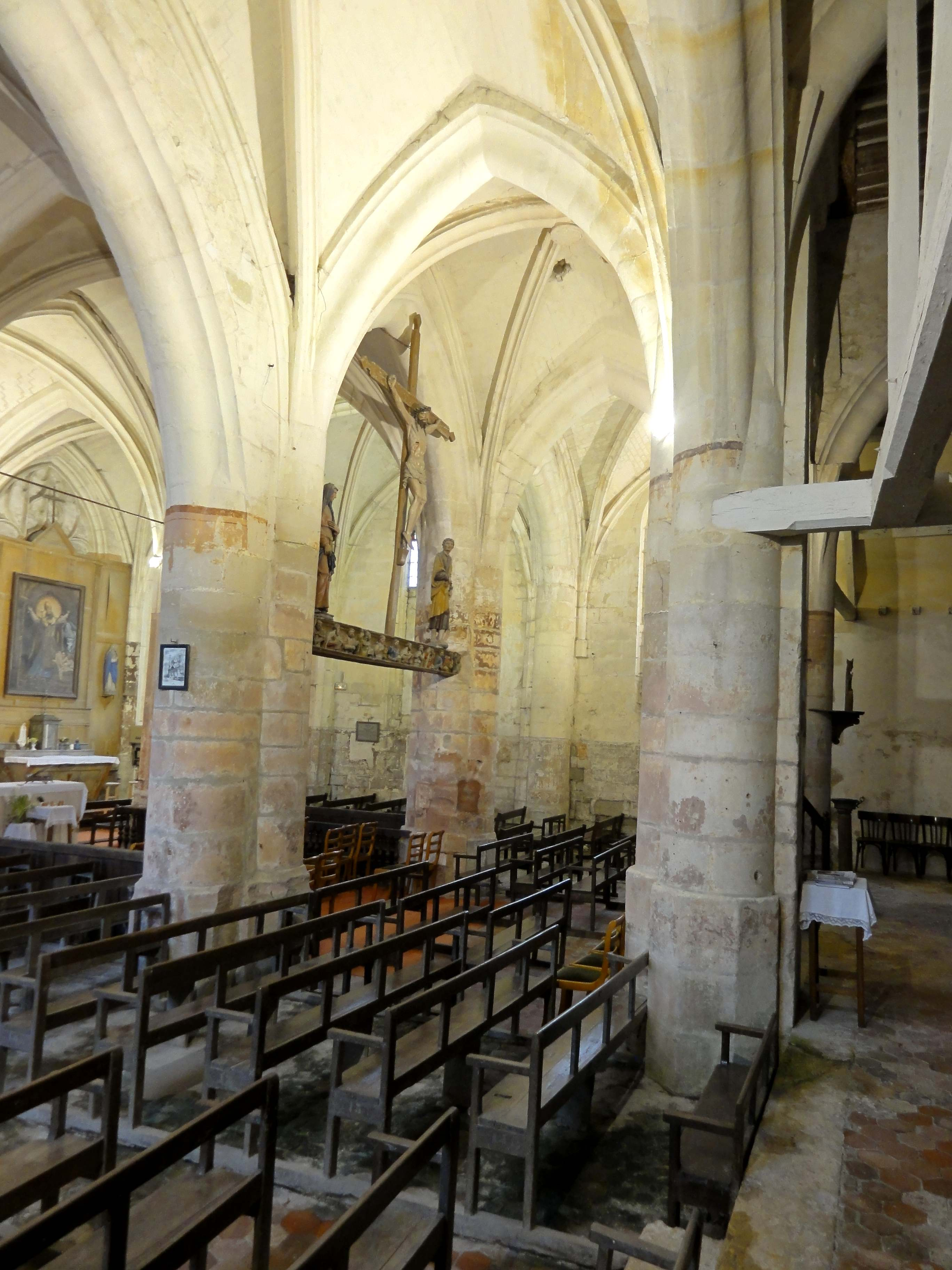 Collatéral nord, 1ère travée, vue vers le sud.